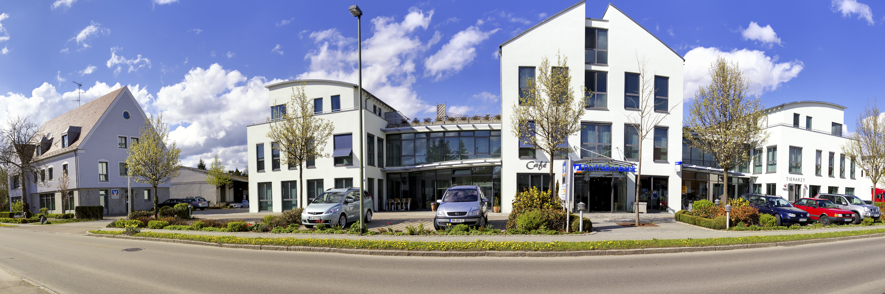 Hauptstelle der Raiffeisenbank Pfaffenhausen eG